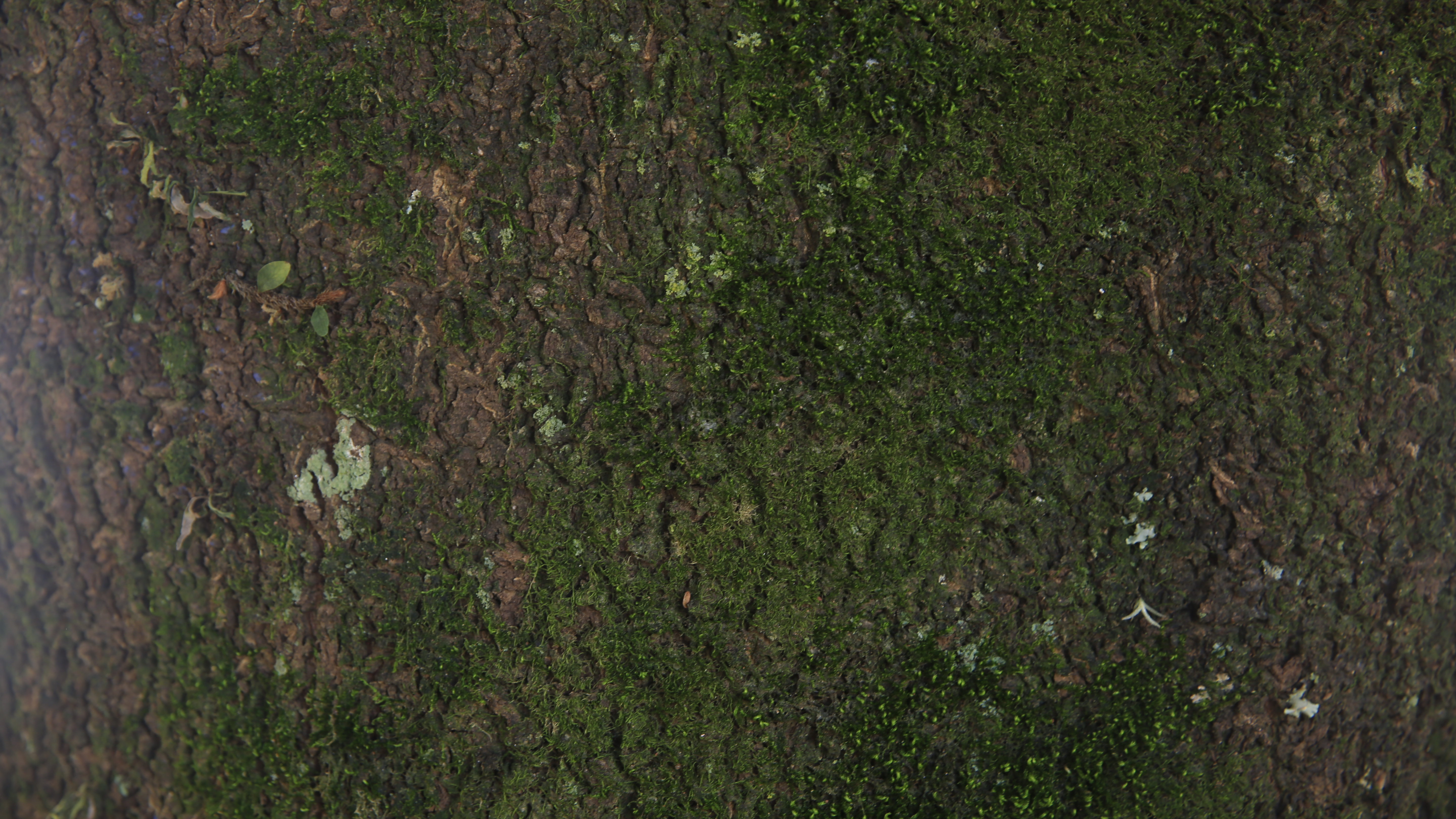 Tronco de Ormosia arborea.